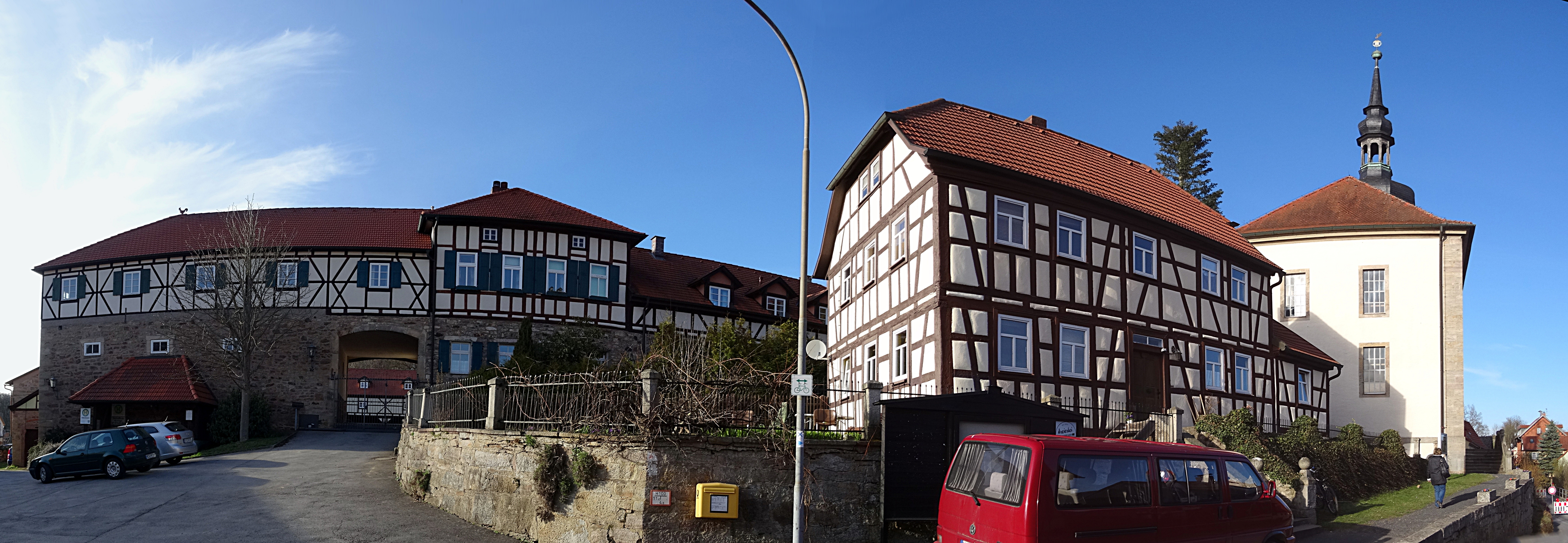 Panorama Schlossplatz in Völkershausen